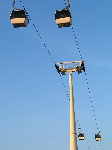 Aerial tramway in Parque das Nações, Lisbon. Photographer: Osvaldo Gago.